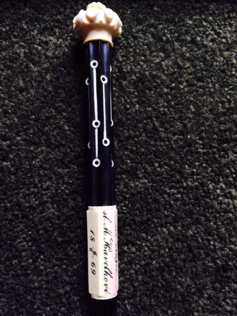 Taktovka. Detail s nápisem: sl. M. Havelkové 6/6 1869.